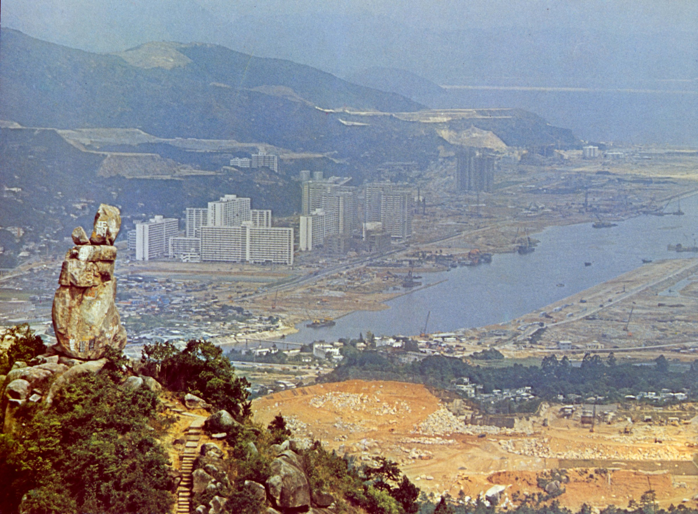 沙田望夫石 Amah Rock (Mong Fu Shek) in Sha Tin, Hong Kong.